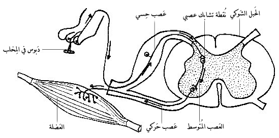 مَقطع تشريحي في الجمجمة